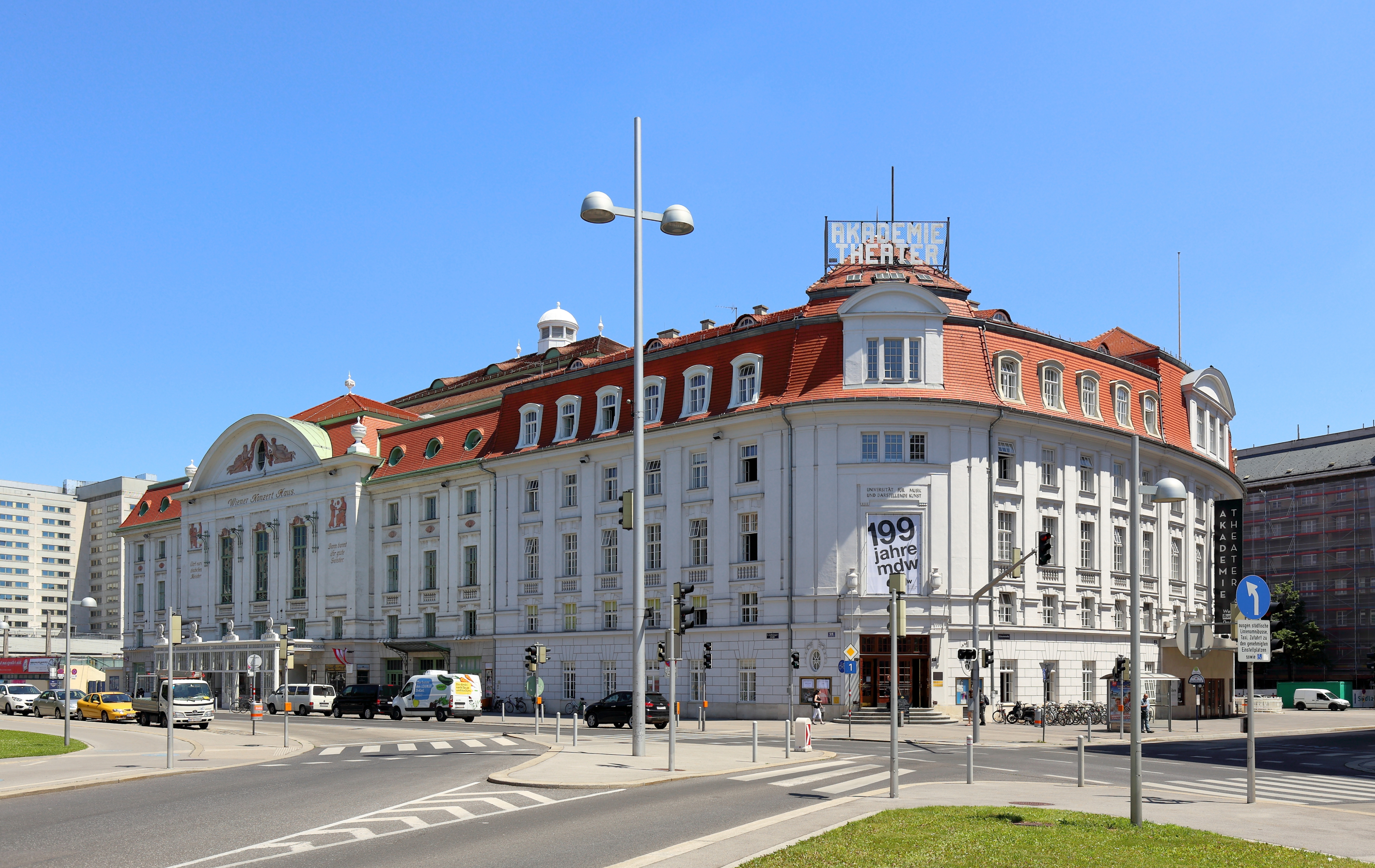 Westansicht des Gebäudekomplexes Akademietheaters und Konzerthauses im 3. Wiener Gemeindebezirk Landstraße.Er wurde nach Plänen der Architekten Ludwig Baumann, Fellner und Helmer im Auftrag der 1908 gegründeten Wiener Konzerthausgesellschaft von 1911 bis 1913 errichtet. Nach der Fertigstellung wurde das heutige Akademietheater als Übungsbühne für die „Akademie für Musik und darstellende Kunst“ dem Staat übergeben, der sich bei der Errichtung finanziell beteiligte. Die Eröffnung des Konzerthauses erfolgte am 19. Oktober 1913 und die der Übungsbühne (Akademietheater) am 4. Februar 1914 mit Giuseppe Verdis Ein Maskenball. Seit 8. September 1922 dient es dem Burgtheater als Zweigstelle.